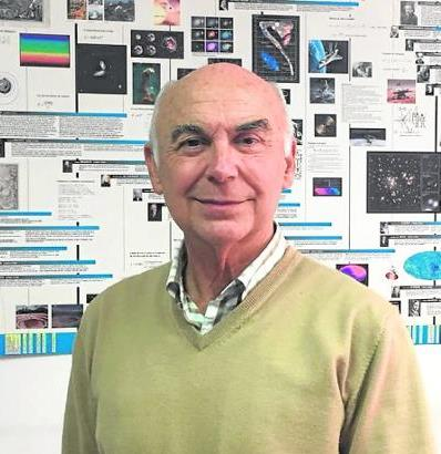 Carlos Spínola